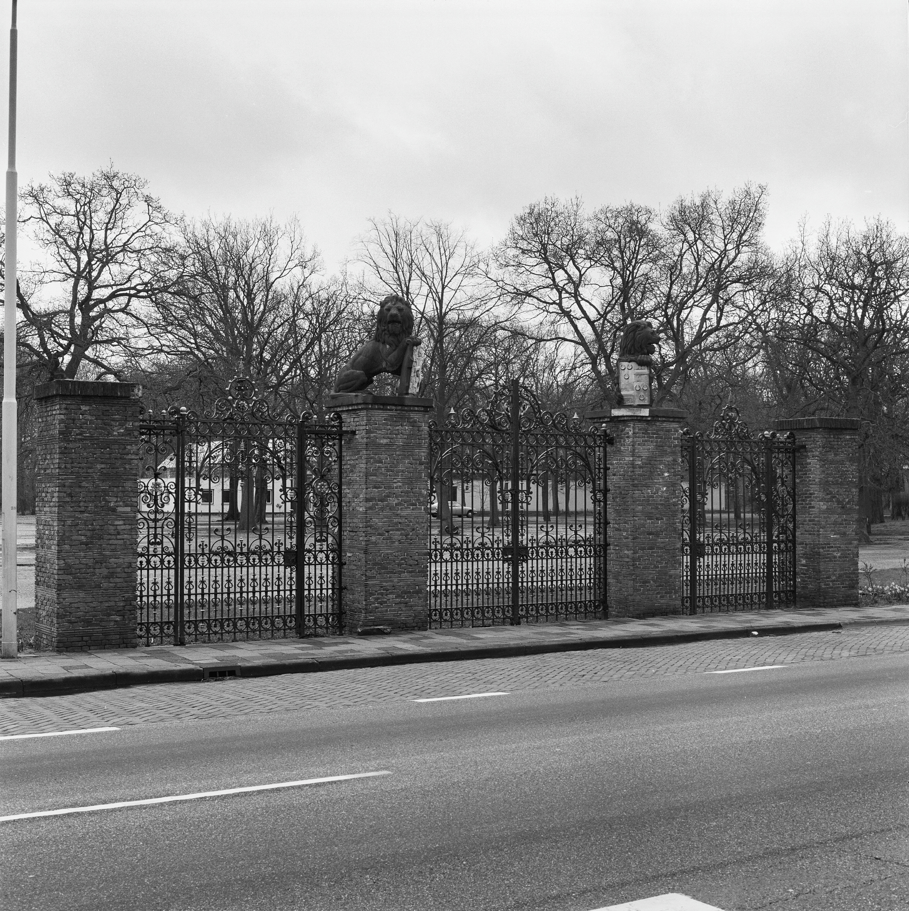 DIERENPARK: Exterieur TOEGANGSHEK